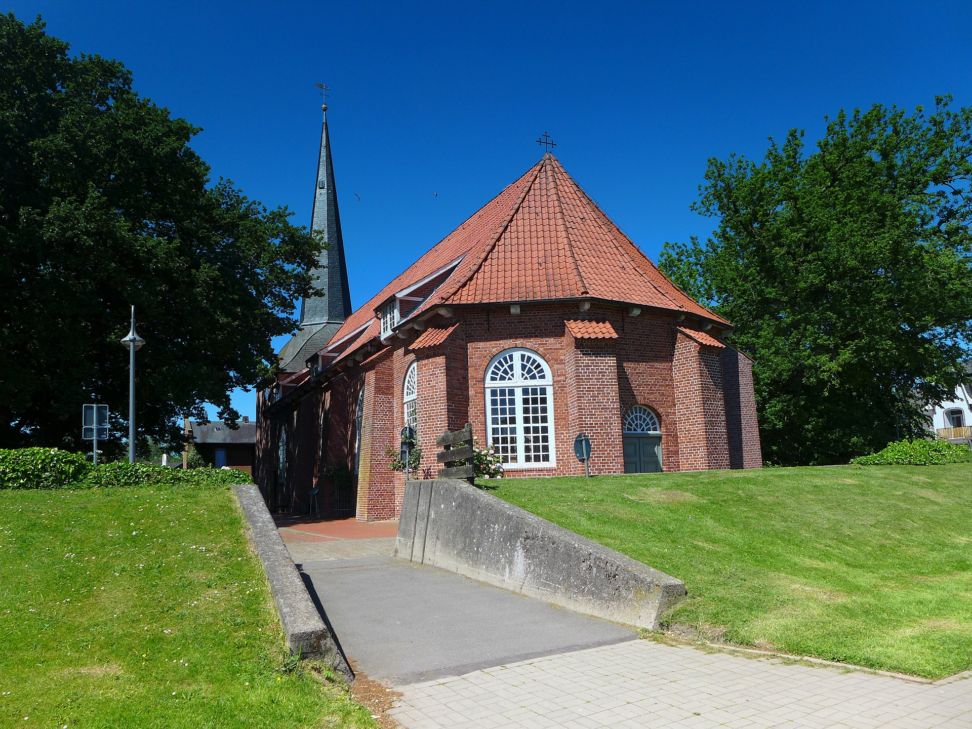 Evangelische Kirche St. Georg erbaut in 1635. Es wurde der Turm des Vorgängerbaues aus dem 13. Jahrhundert verwendet. Aufnahmedatum 2015-06.